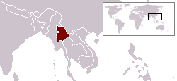 расположение Государства Шан